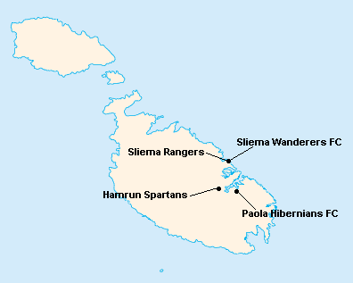 Répartition des clubs en First Division Maltaise 1932-1933.